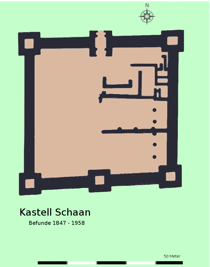 Befundplan des spätantiken Kastell von Schaan, Lichtenstein.